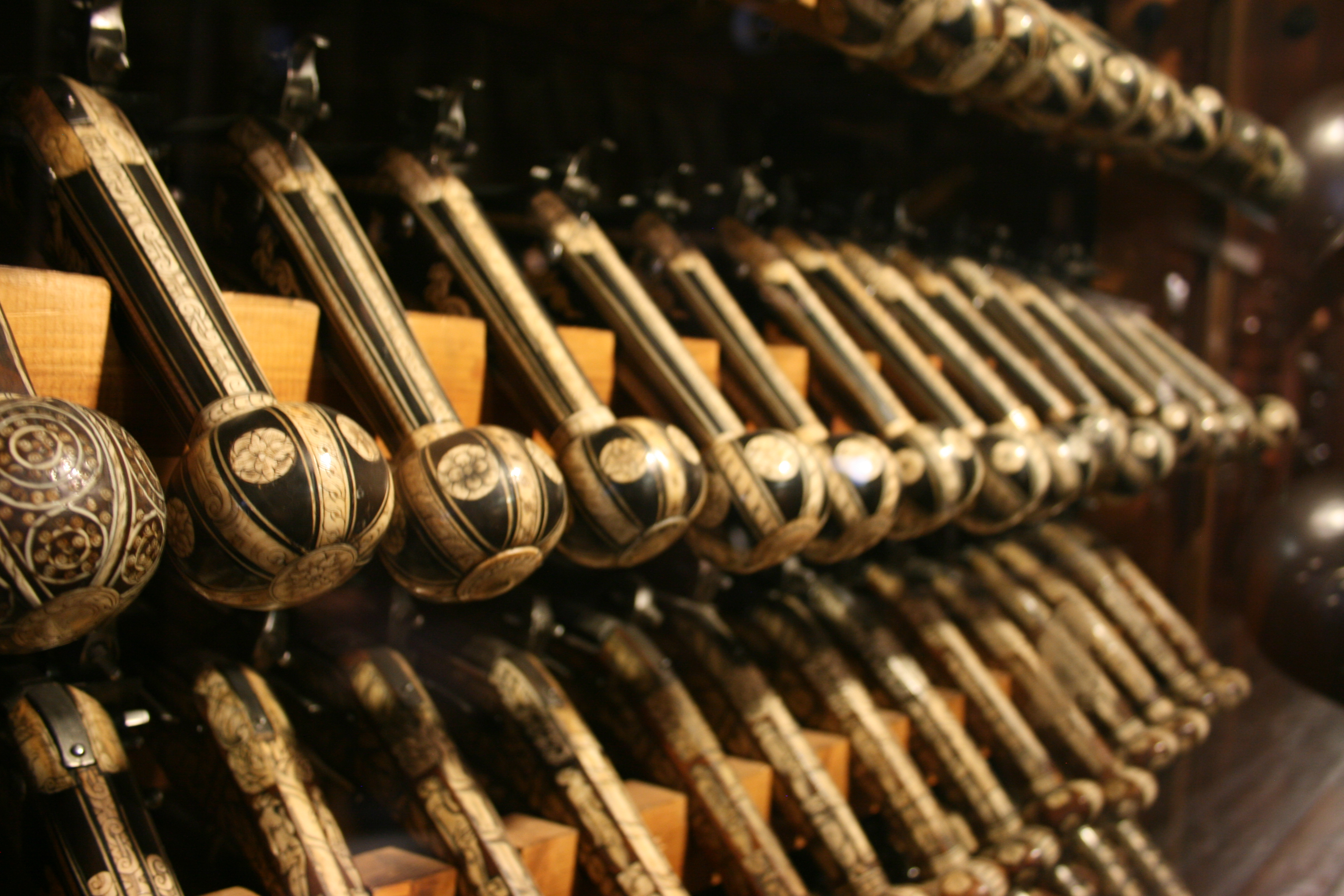 Verzierte Offiziers-Radschlosspistolen im Landeszeughaus Graz.